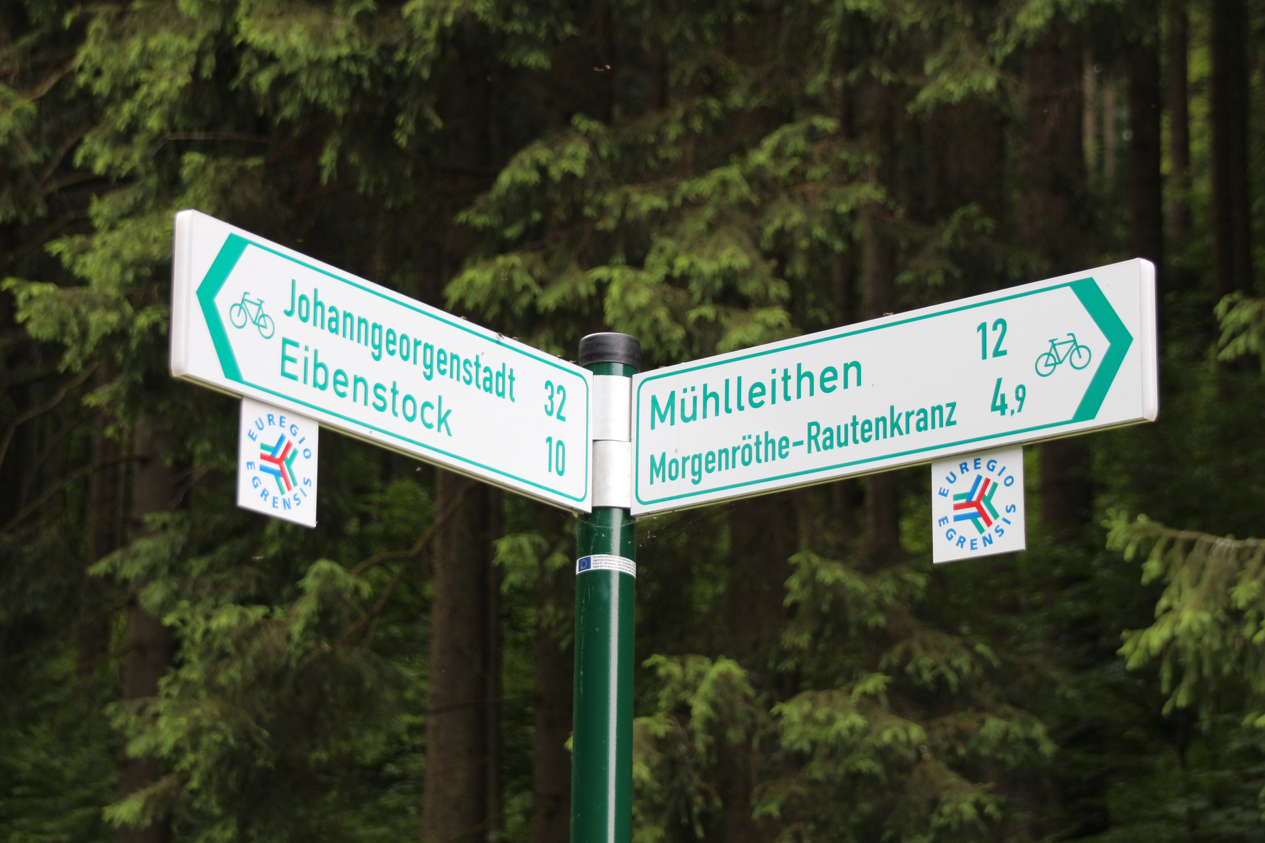 Wilzschmühle Der Fernradweg “Euregio Egrensis“ führt auf 530 Kilometern durch Bayern, Thüringen, Sachsen und Böhmen. Im Westerzgebirge verbindet er die Orte Eibenstock und Morgenröthe-Rautenkranz miteinander und führt durch Wilzschmühle. Nach dem Überqueren einer Brücke über den Wolfseifenbach geht die Strecke auf der Staatsstraße durch Wilzschmühle abwärts in Richtung Neues Wiesenhaus und von dort nach Morgenröthe.